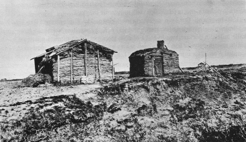 Turpasmökkejä Limingassa vuonna 1910.